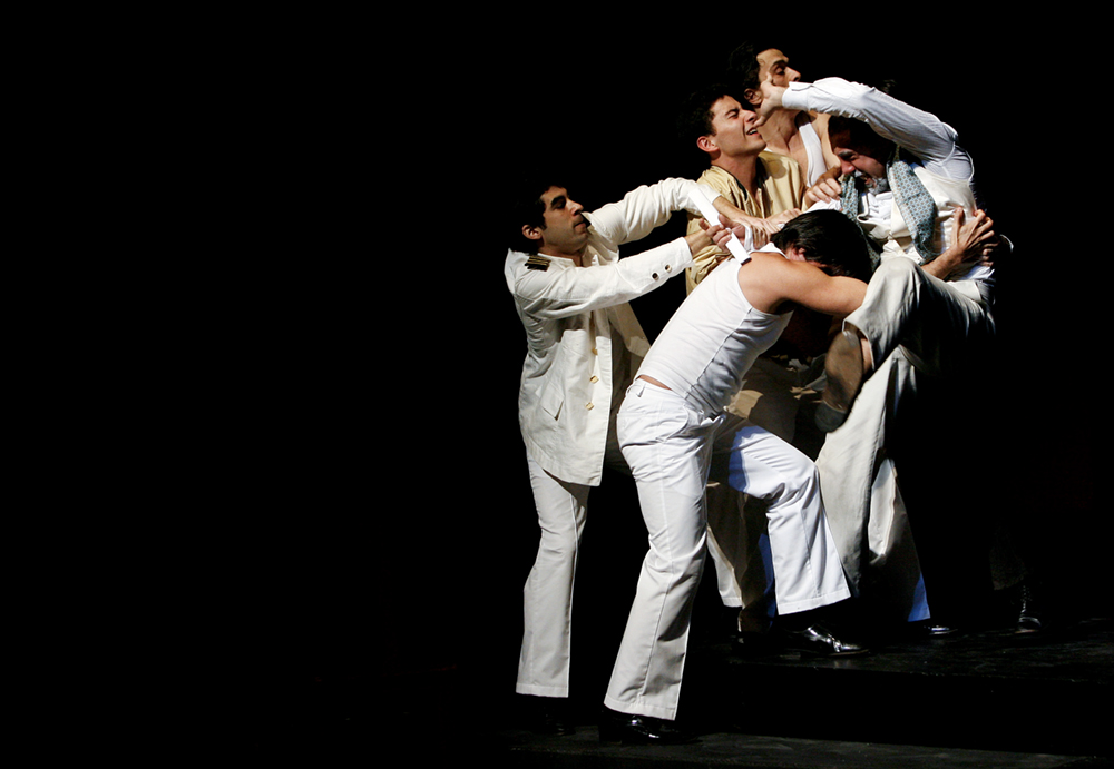 Ensaio do espectáculo "Esta Noite Improvisa-se", de Luigi Pirandello, com encenação de Jorge Silva Melo, que estará em cena no Teatro D. Maria II de 5 de Março a 5 de Abril, 26 Fevereiro 2009, em Lisboa.